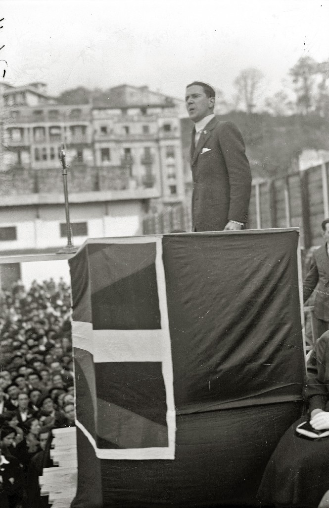 Telesforo Monzon 1933ko Aberri Egunean. Donostia, Gipuzkoa, Euskal Herria. Telesforo Monzon in 1933 Aberri Eguna. Donostia, Saint Sebastian, Gipuzkoa. Basque Country.